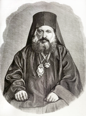 Митрополит Амасийский Софроний (1812-1887), не путать с его предшественником по кафедре, тоже митрополитом Софронием, впоследствии Константинопольским Патрирхом